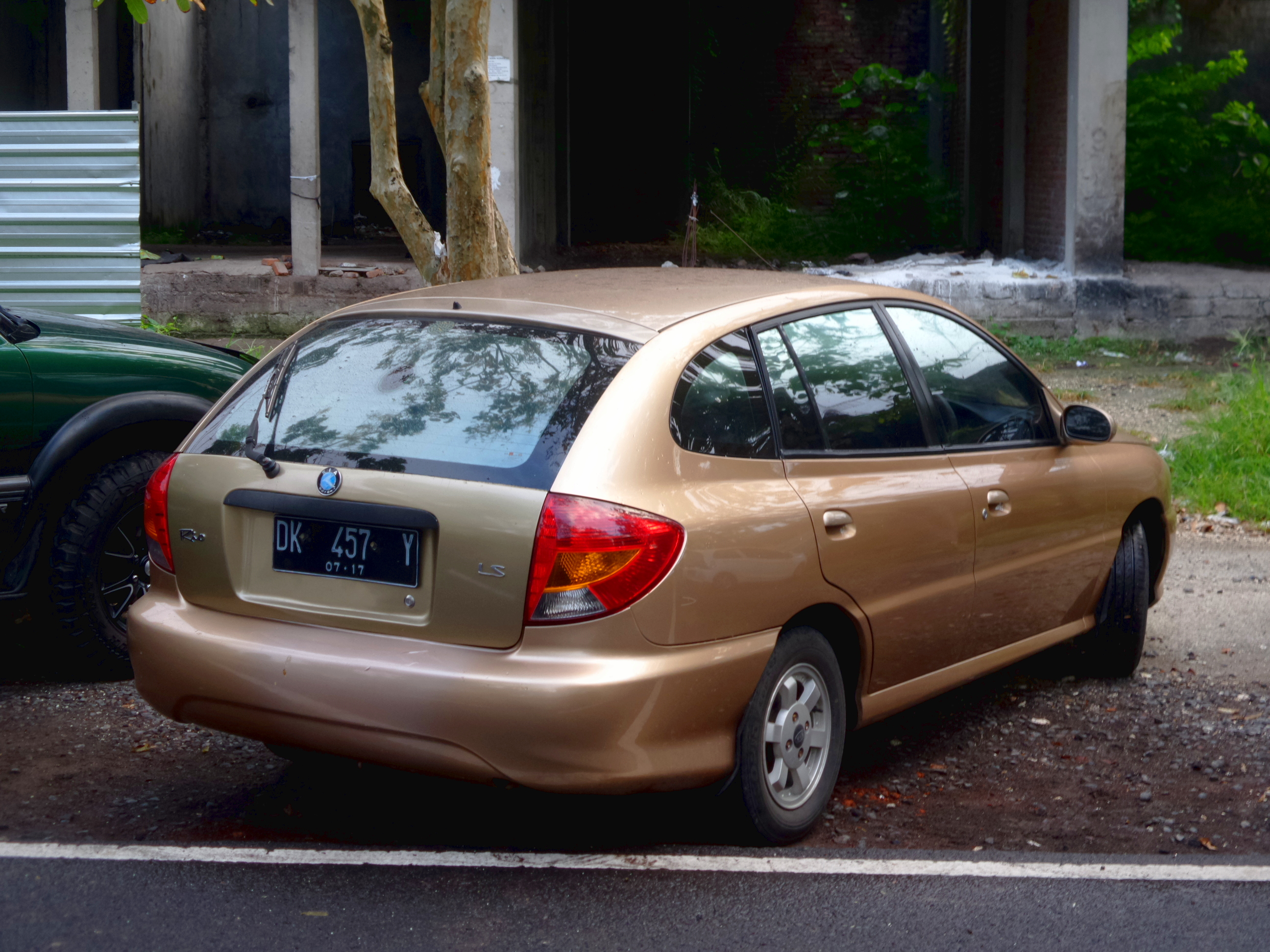 Bagian belakang Kia Rio LS yang diparkir di sisi Jalan Cut Nyak Dhien, Kota Denpasar, Bali.